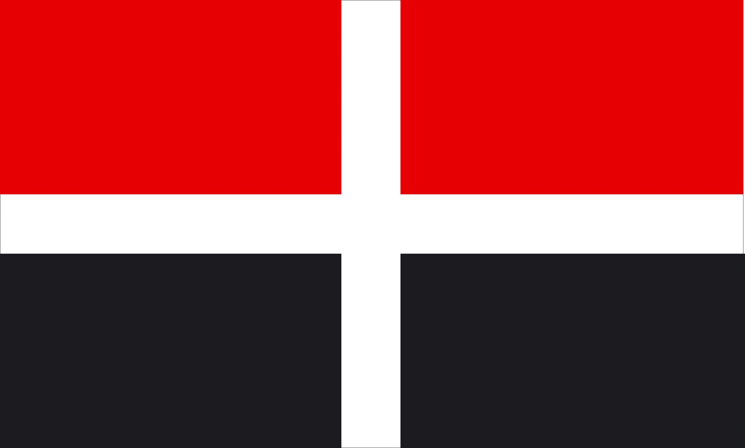 Drapeau alternatif de la Vallée d'Aoste utilisé par la Ligue du Nord